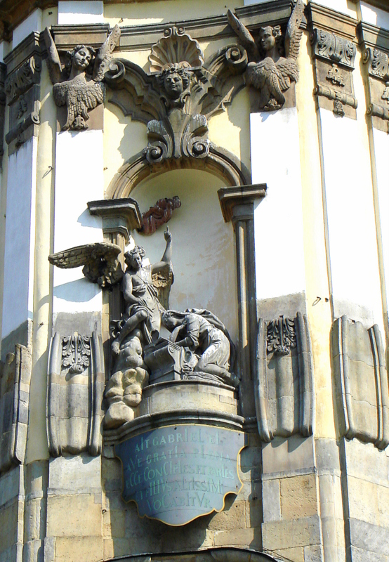 Krzeszów, kościół pw. Wniebowzięcia NMP, fasada, Zwiastowanie